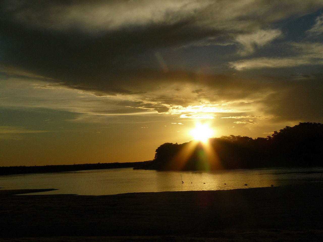 Fotos de los refugios y reservas de Itaipu, tomadas en los años 2007 y 2008 por mí